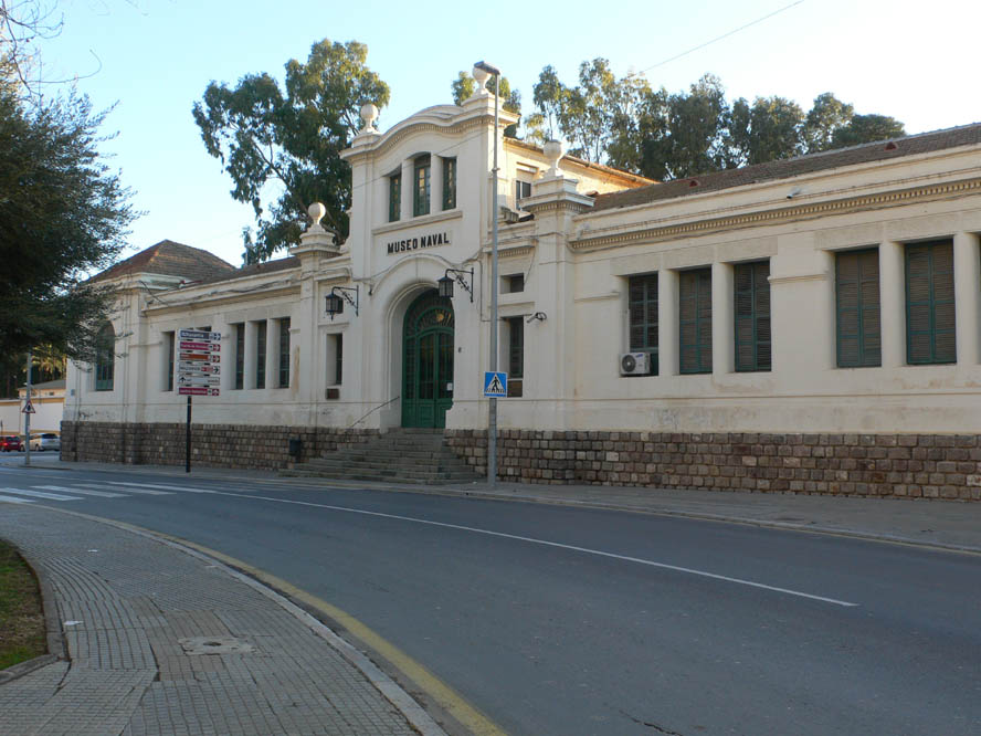 Antigua sede del Museo Naval de Cartagena.